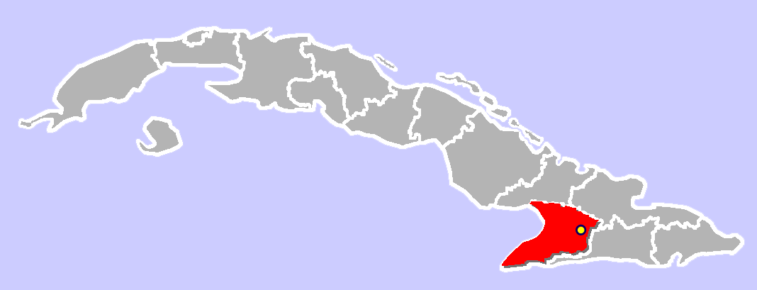 Mapa de Cuba Mostrando de la Ciudad Bayamo Location of Bayamo, Cuba